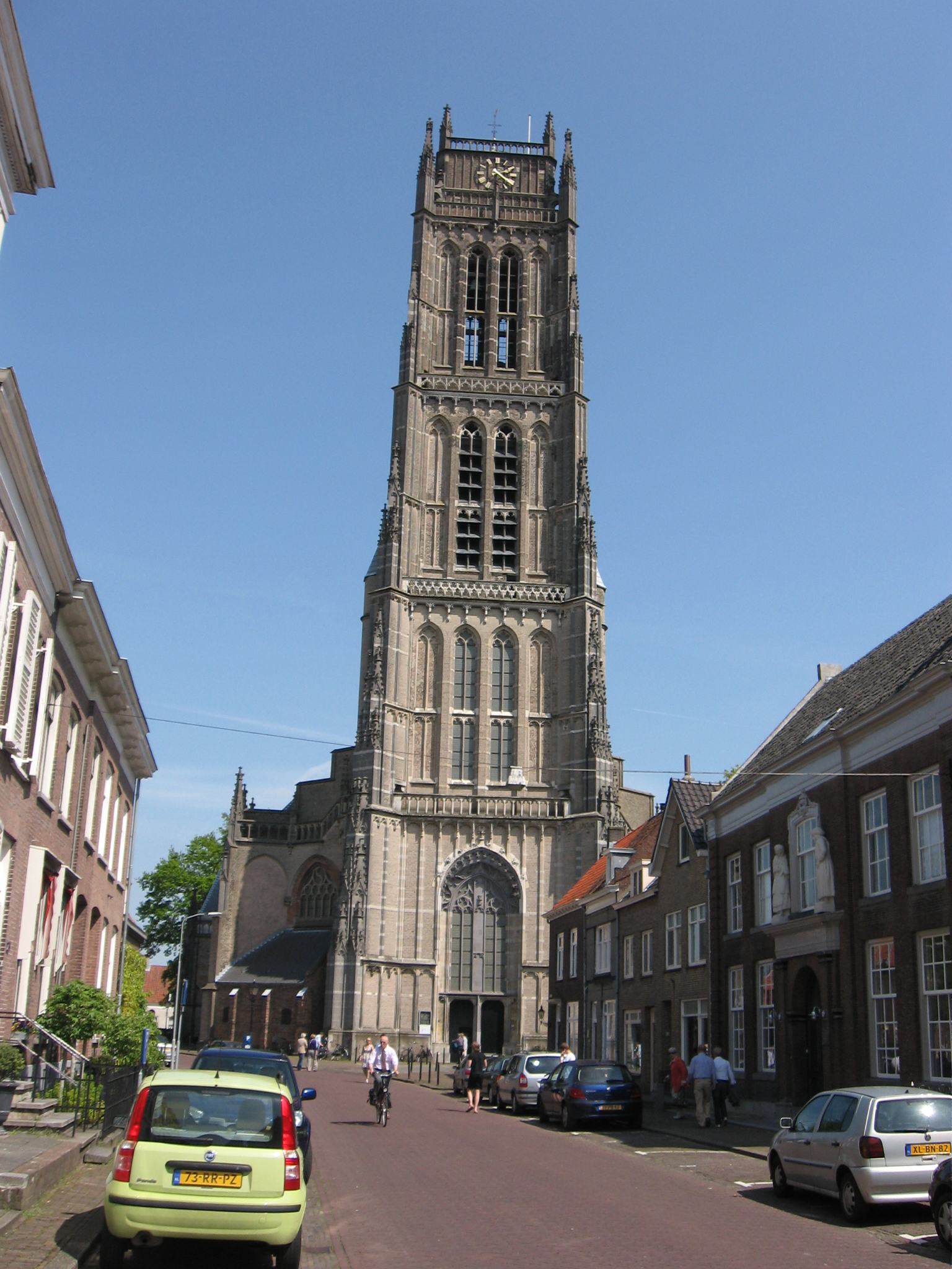 Zaltbommel